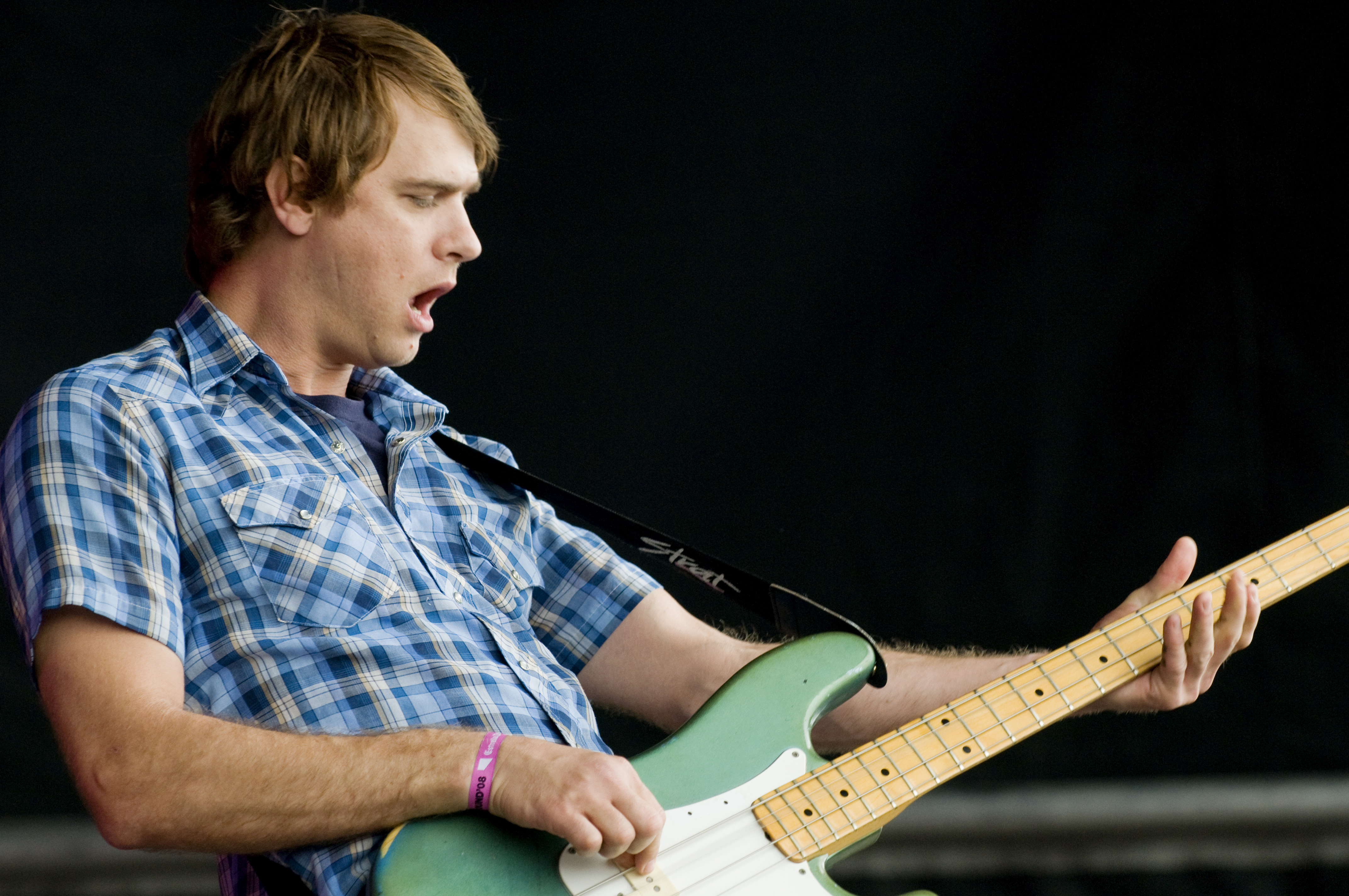 Buffalo Tom